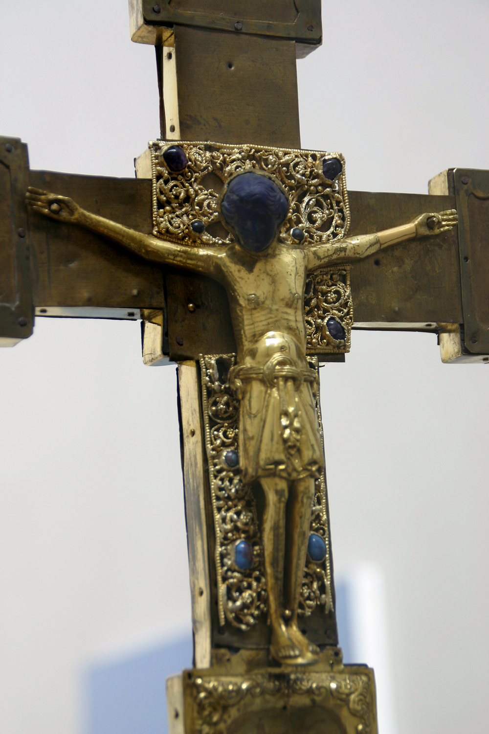 Hermann-Ida-Kreuz im Kölner Diözesanmuseum (Kolumba), Teilansicht Vorderseite